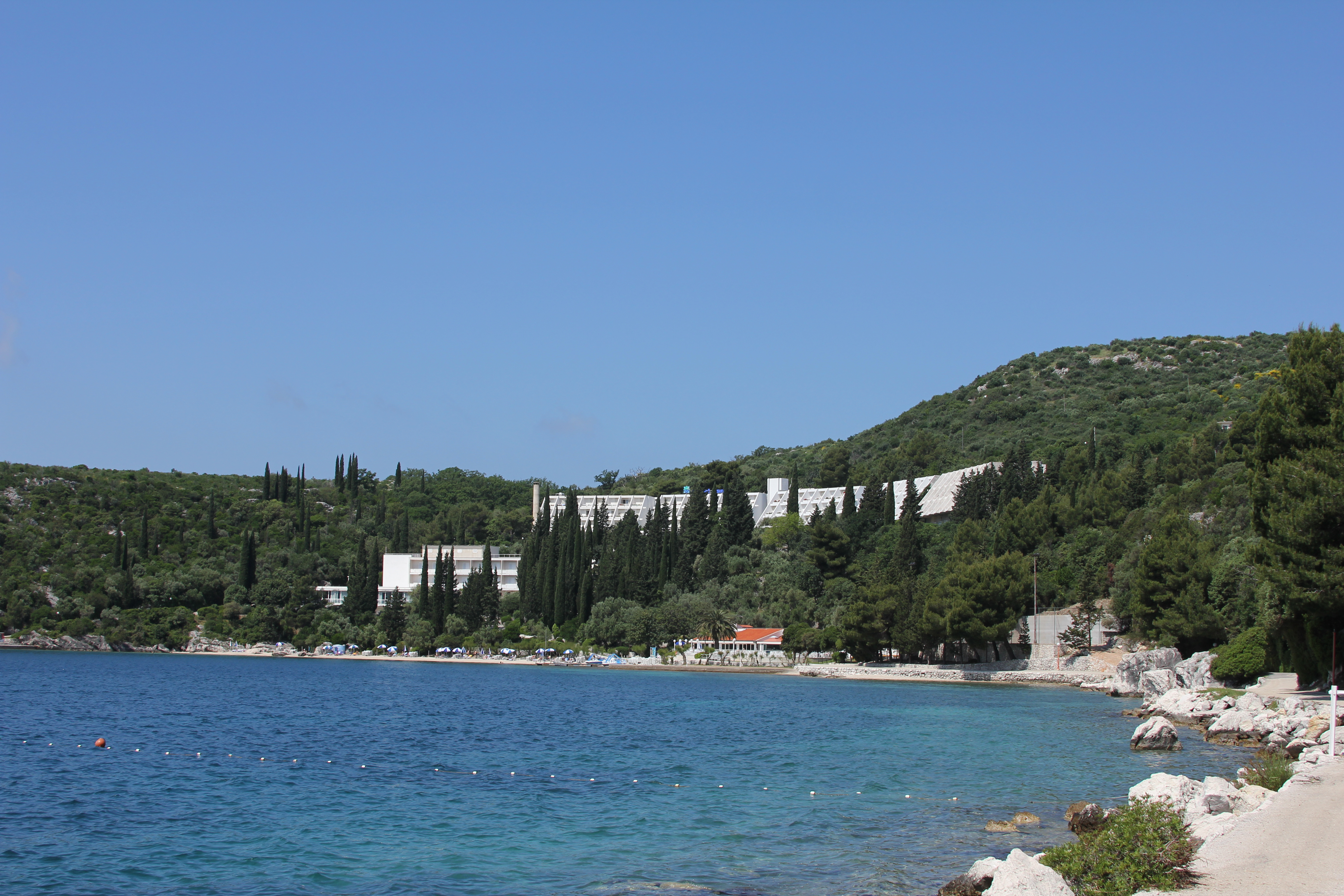 Hotel Osmine - Slano, Općina Dubrovačko Primorje, Dubrovačko-neretvanska županija, Croatia